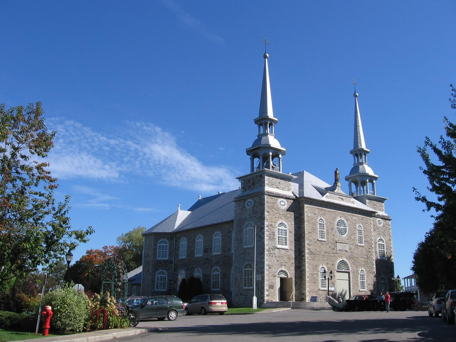 Deshambault church